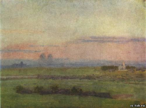 Мещерин Н.В.